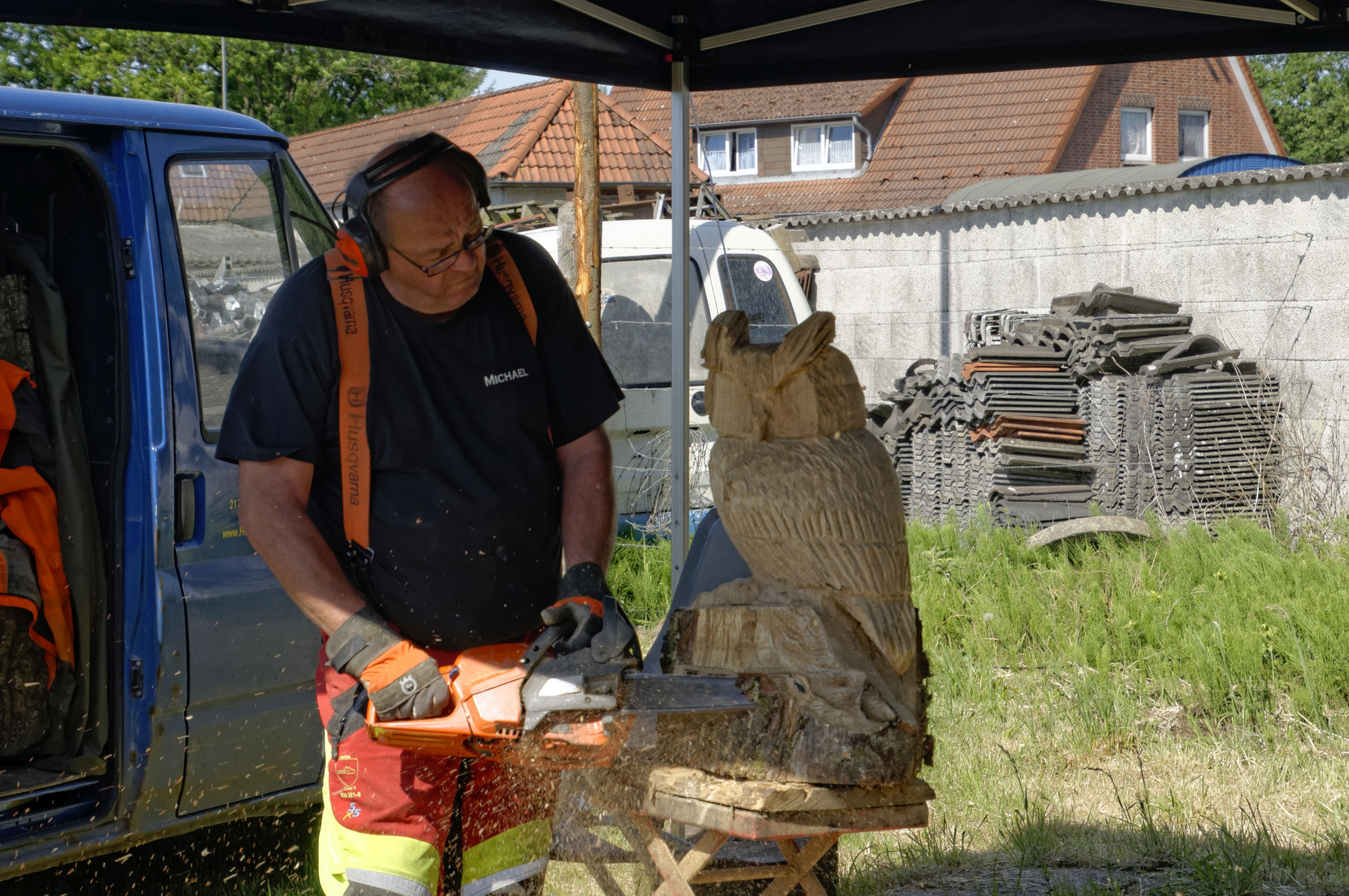 Die Oldtimerfreunde Westersode und Umgebung e. V. luden Besitzer alter Traktoren, PKW, LKW, Motorräder und landwirtschaftlicher Geräte zur großen Oldtimer-Ausstellung mit Teilemarkt und Vorführung historischer Technik ein.